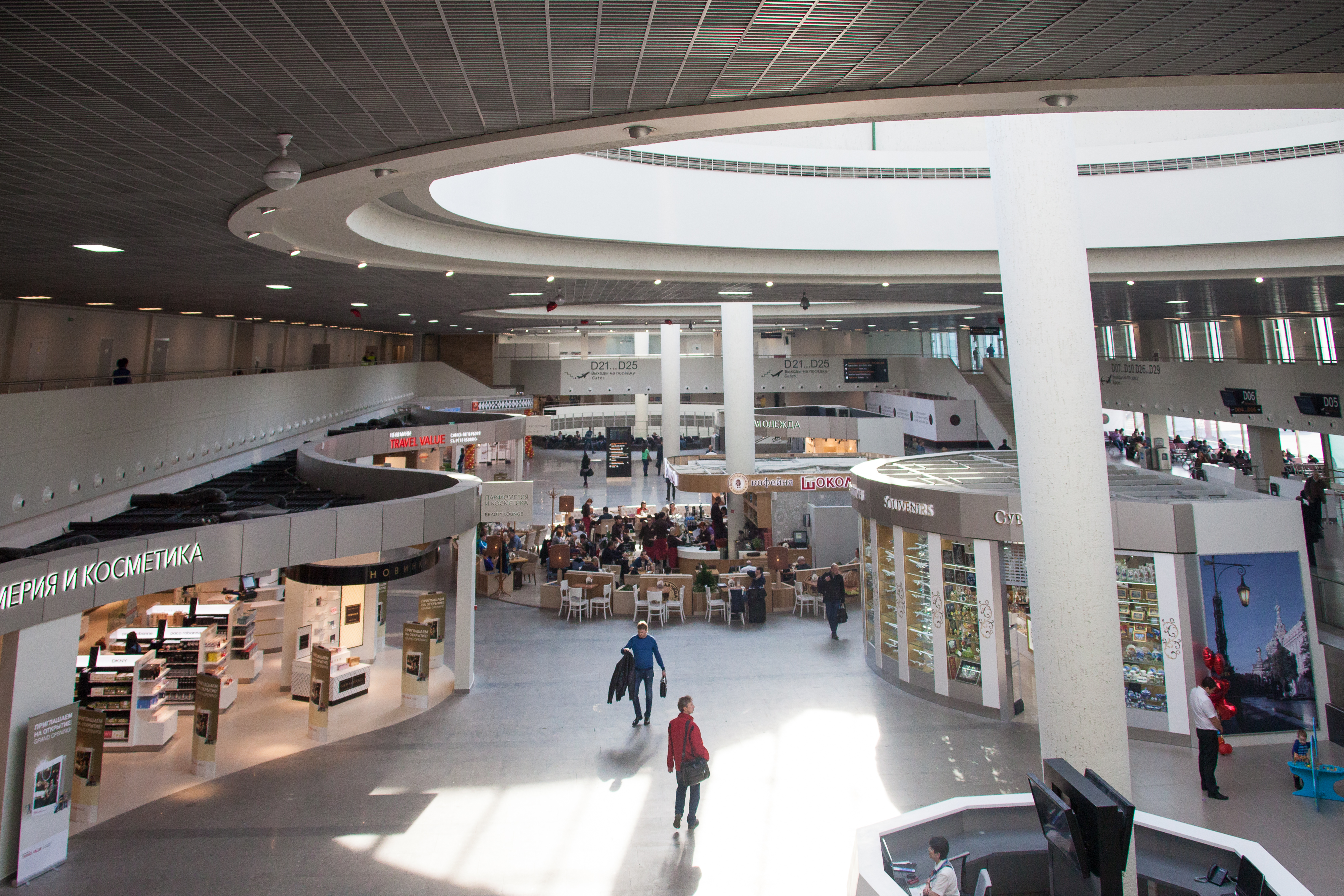 Пулково-1 после реставрации